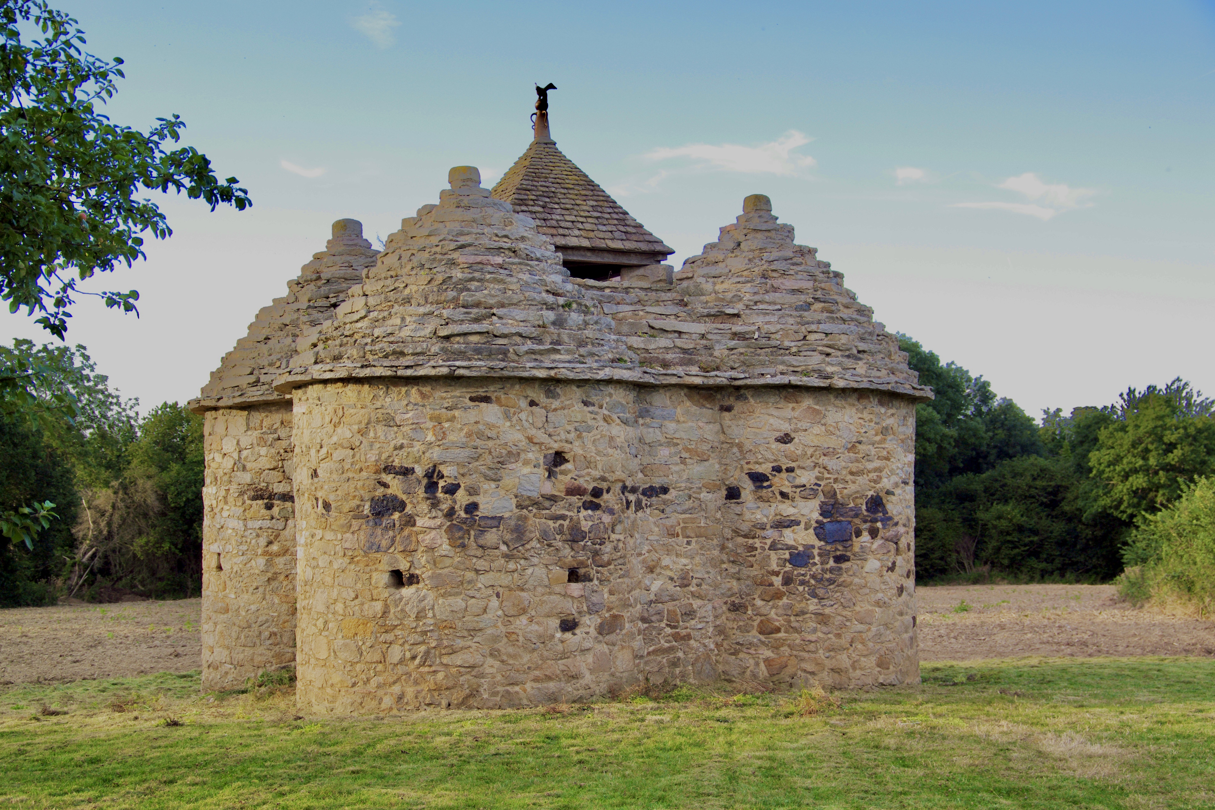 Pigeonnier de l'ancien manoir de Vaujoyeux, (Classement, 1982)